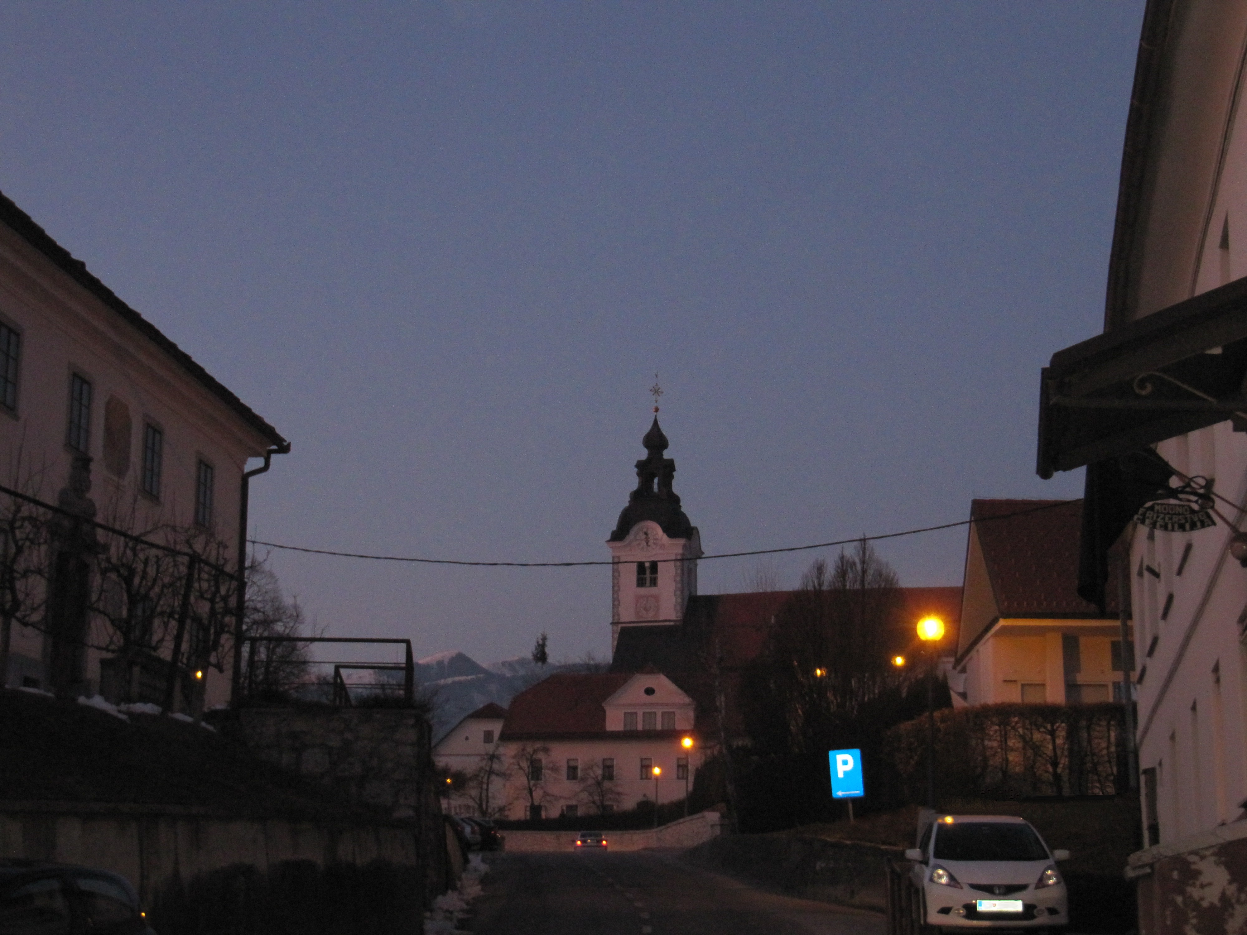 Komenda